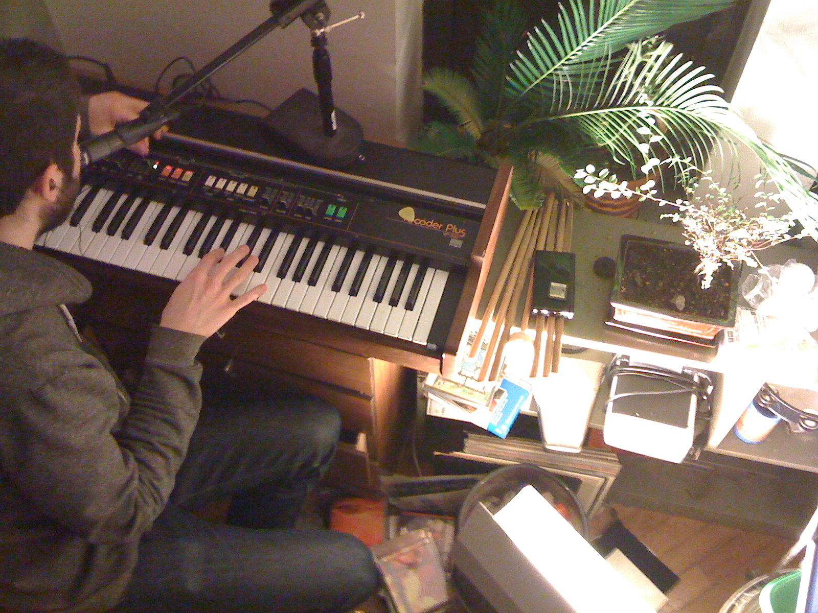 Roland VP-330 Vocoder Plus (later model) alex studio